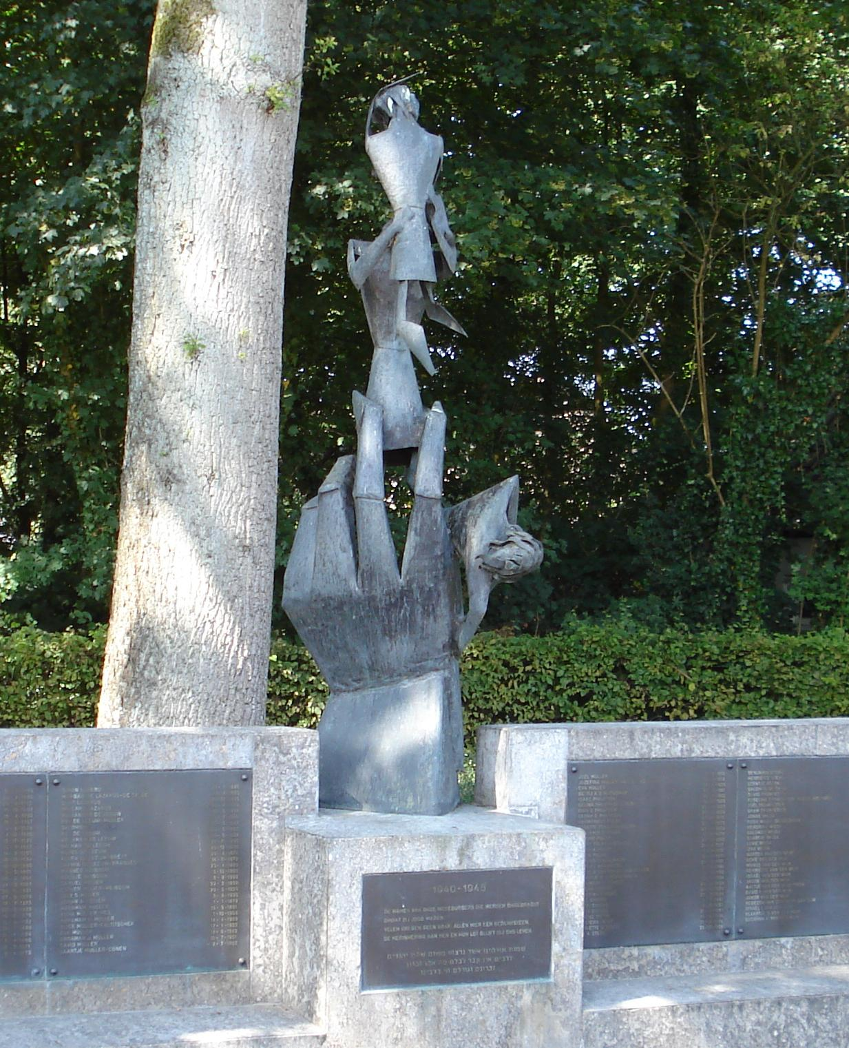 Hoogeveen, Zuiderweg. Joods monument 1940-1945 van Wim v.d. Hoek. Hoogeveen/The Netherlands.